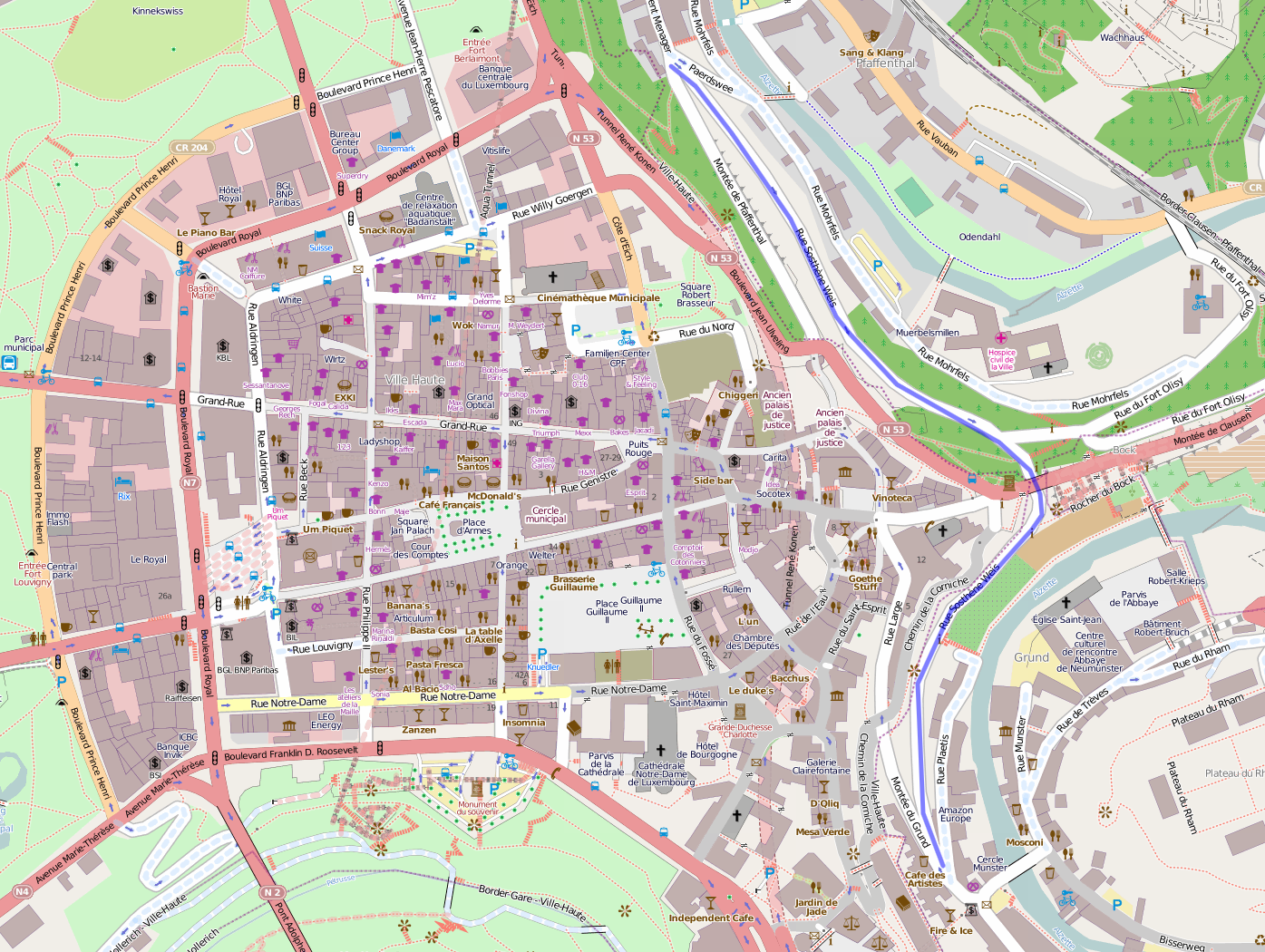 Blo ervirgehuewen: d'Sosthène-Weis-Strooss tëschent dem Stadgronn an dem Pafendall an der Stad Lëtzebuerg.